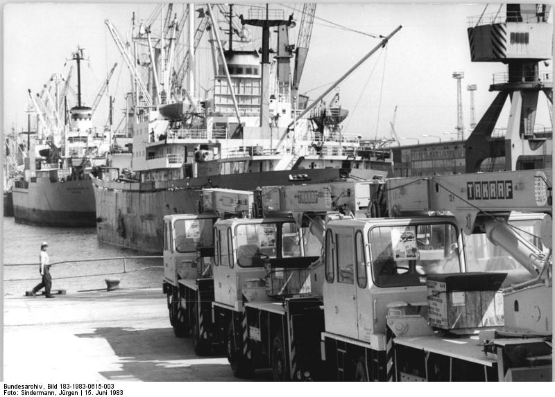 Rostock, Überseehafen, Frachter, Autodrehkräne ADN-ZB Sindermann 15.6.83-Ldg - Rostock: Hohe Leistungen beim Umschlag von Im- und Exporten vollbringen die Kollektive des Rostocker Überseehafens und deren Kooperationspartner. Autodrehkrane des Kombinates TAKRAF werden fachgerecht an Bord gebracht und nach Vietnam transportiert.